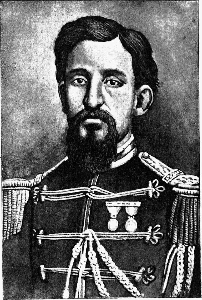 Teniente Coronel Don Gaspar Campos, muerto prisionero de los paraguayos en Itai-Vaté.